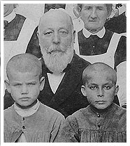 José Sanchís Bergón fundador y presidente de la Asociación Valenciana de la Caridad (1906)